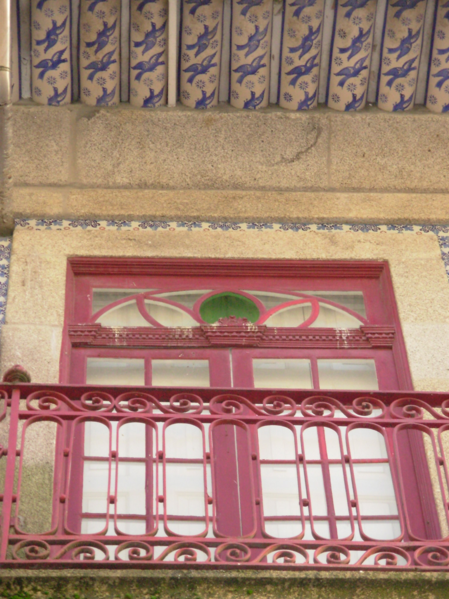 Janela e beiral de azulejos na rua Miguel Bombarad, Porto, Portugal